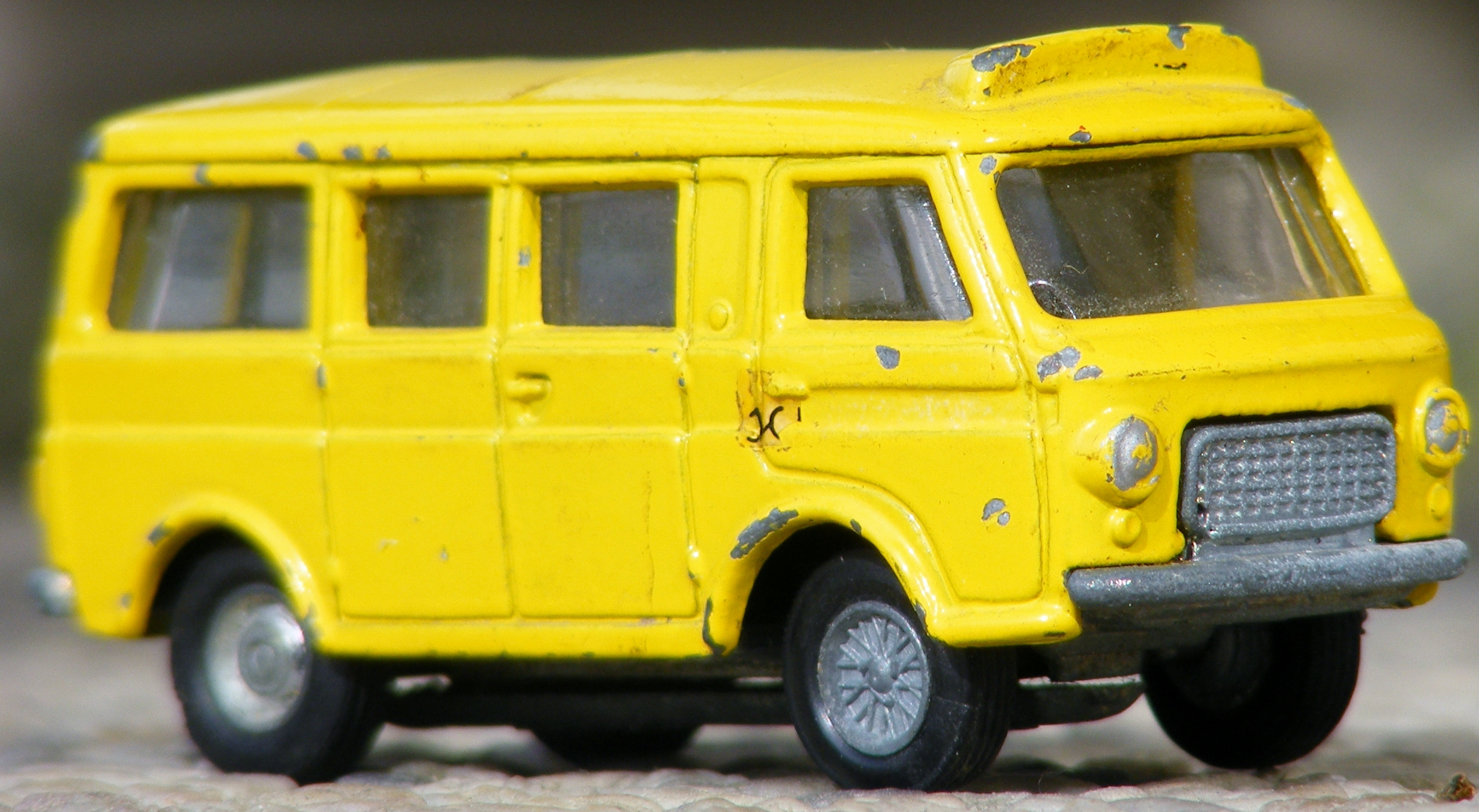 Speedy modelauto van een Fiat 248